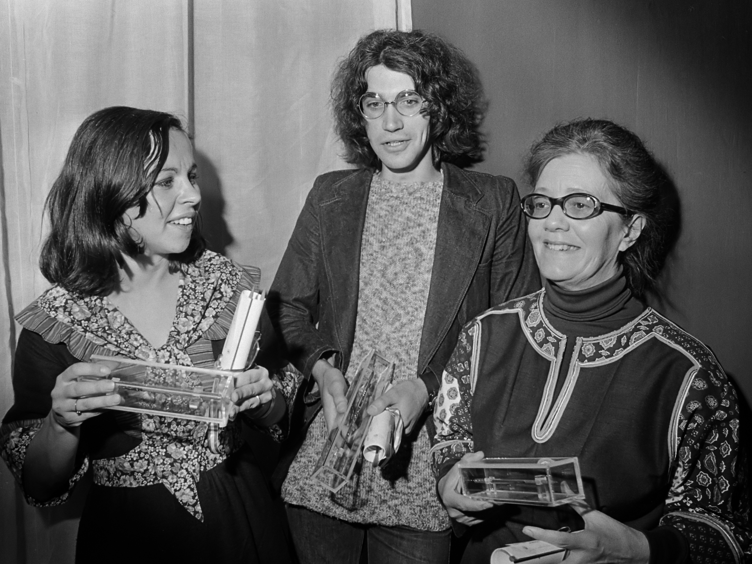 Gouden griffels voor beste kinderboeken in Amsterdam uitgereikt; v.l.n.r. Simone Schell , Paul Hulshof en Alet Schouten met onderscheidingen 15 oktober 1975